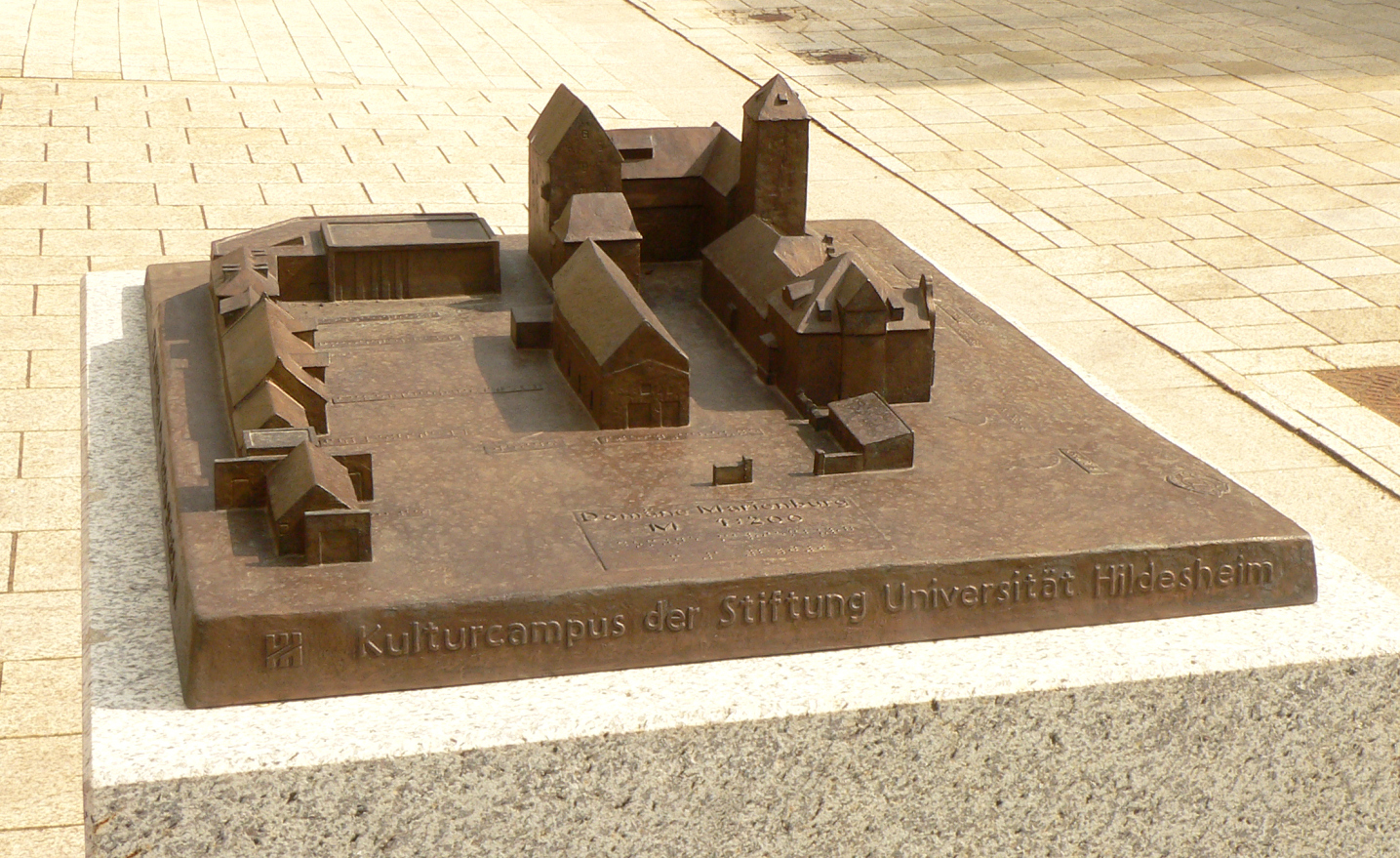 Marienburg (Hildesheim) Modell am Eingang des Geländes